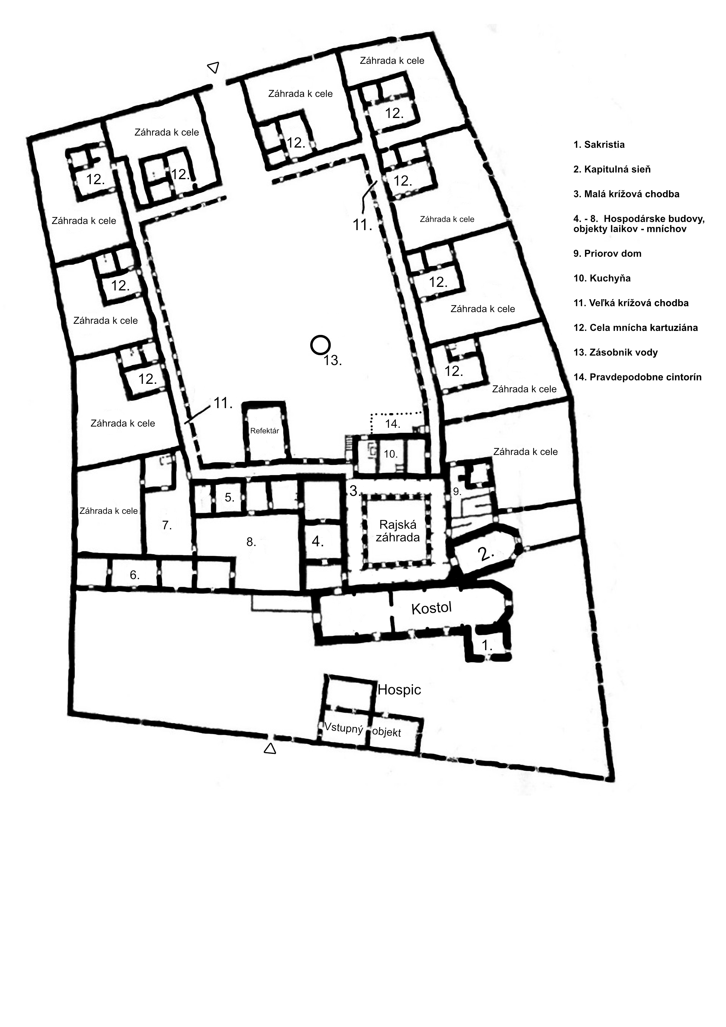 Kláštorisko pôdorys, podlľa archeologického výskumu Doc. PhDr. Michala Slivku CSc.